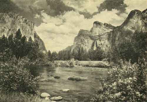 THE GATEWAY